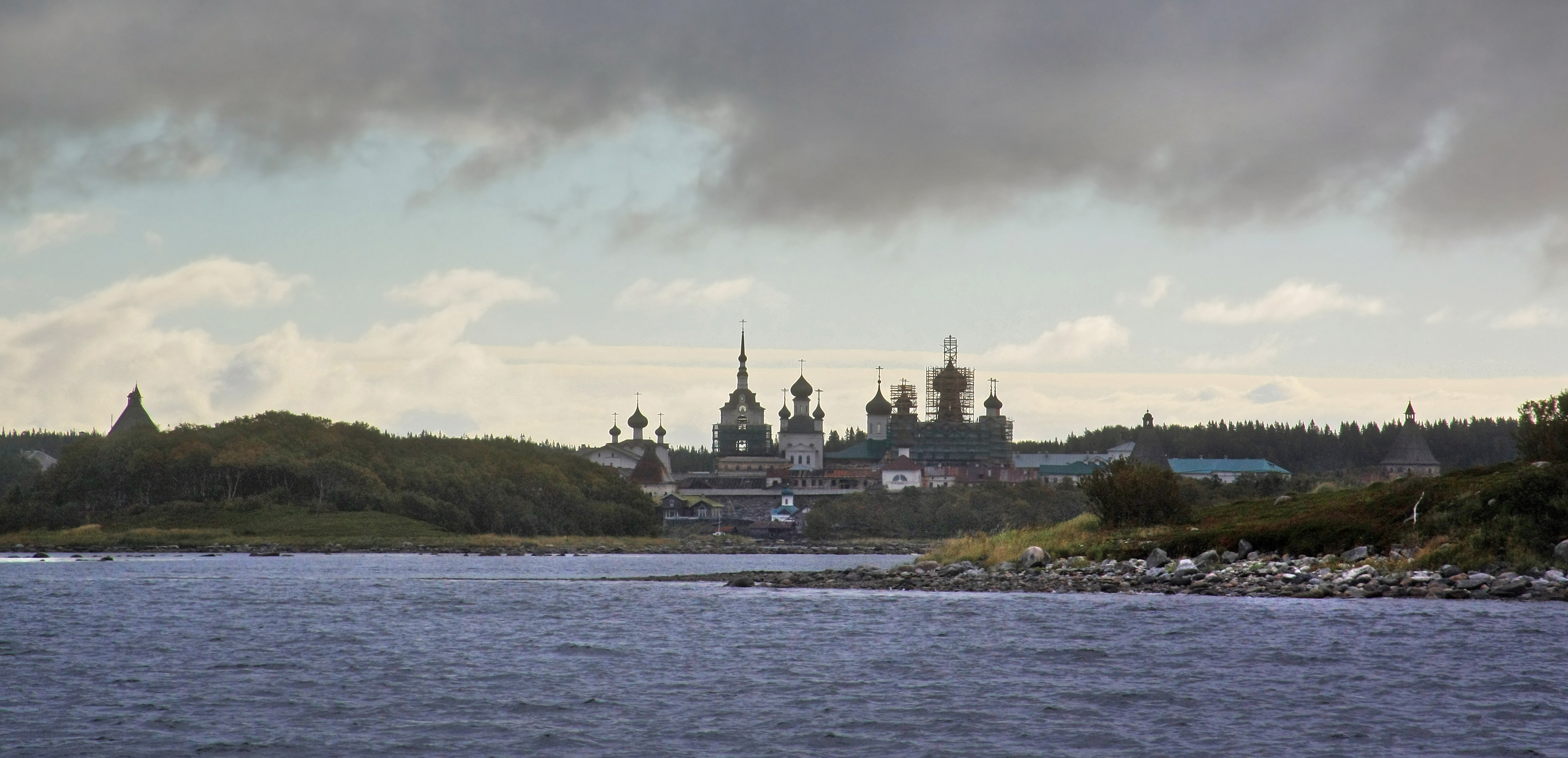 Solovetsi küla